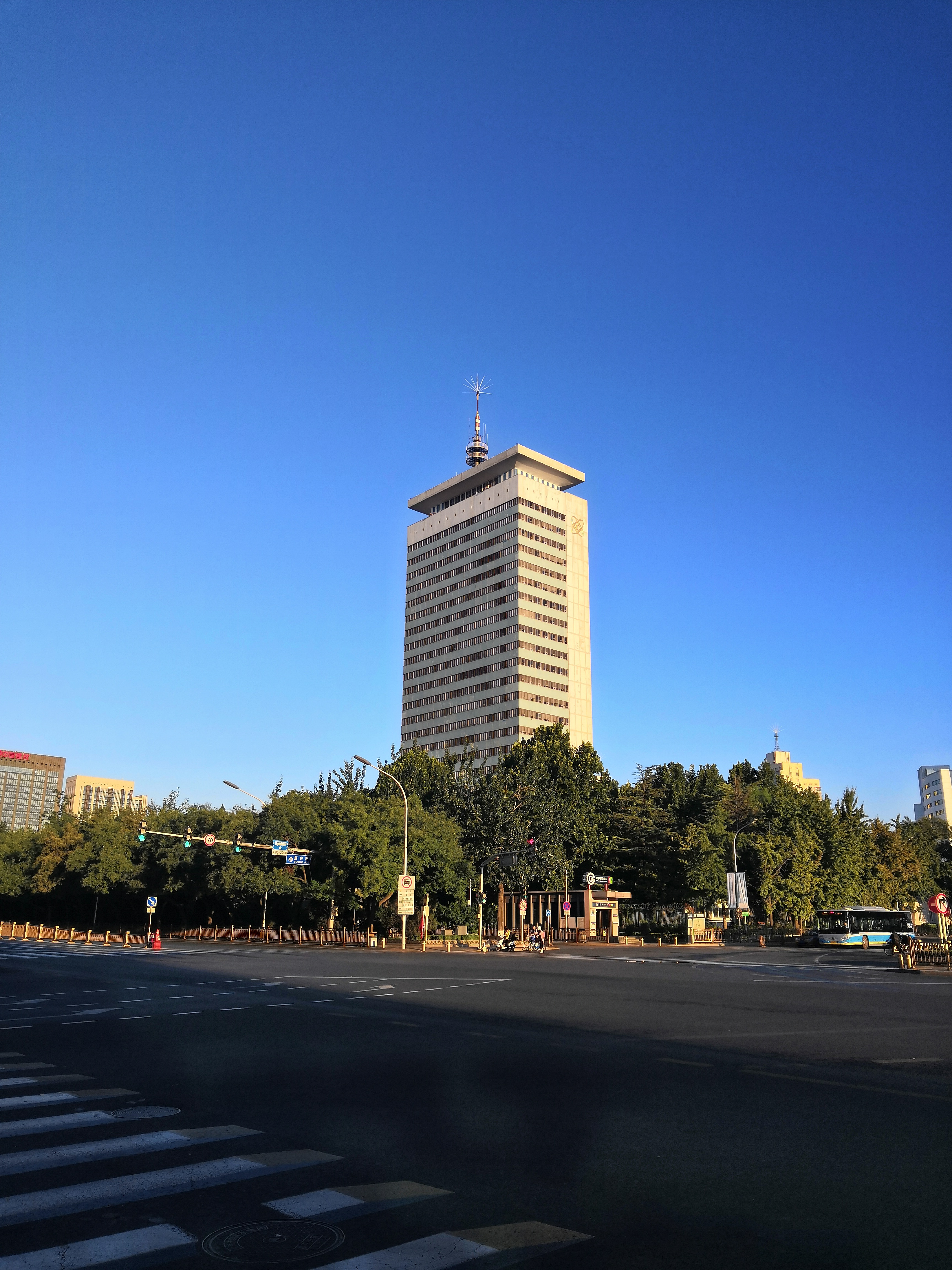 中文（中国大陆）: 中央电视台彩色电视中心